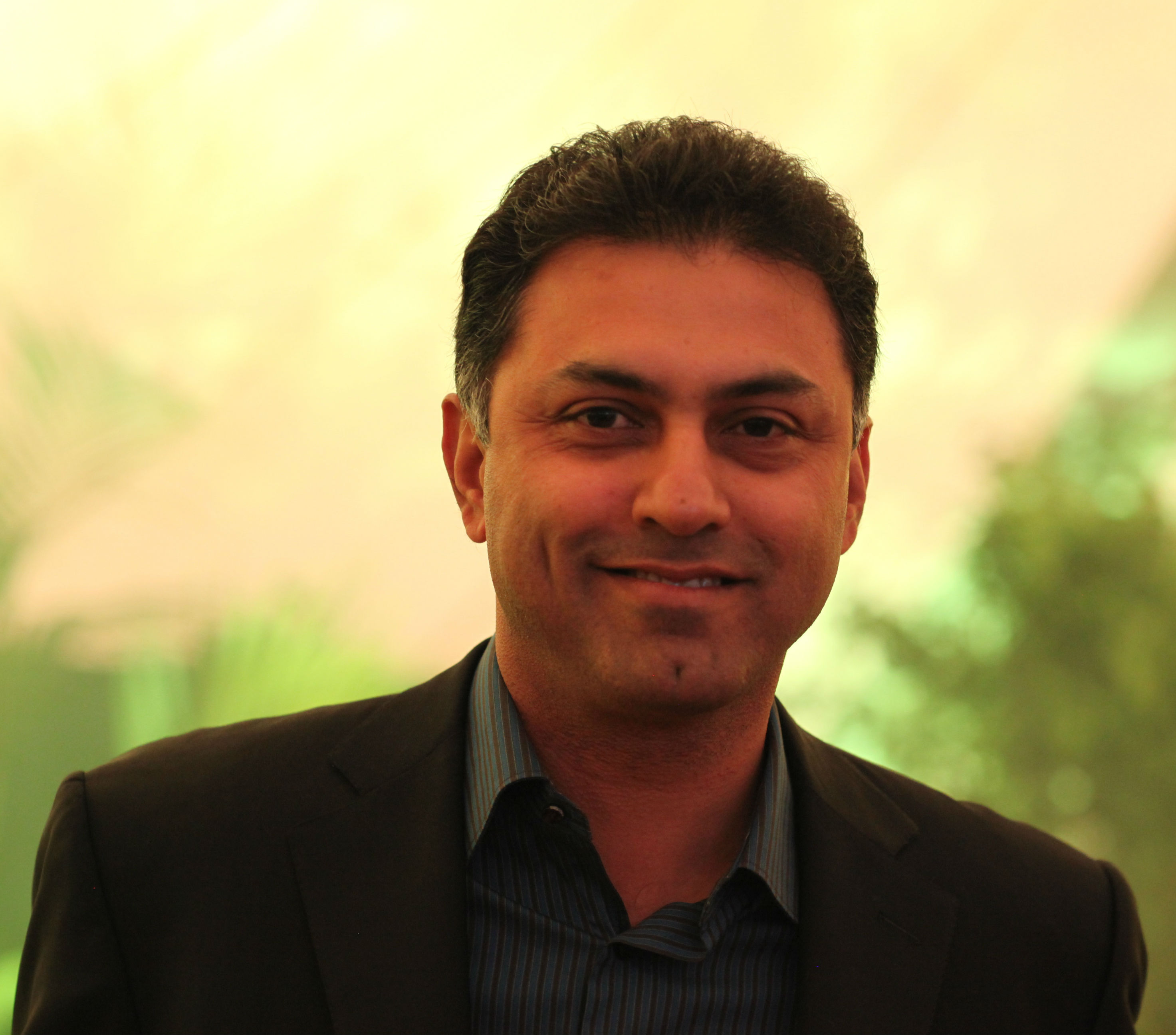 Google Zeitgeist 2009